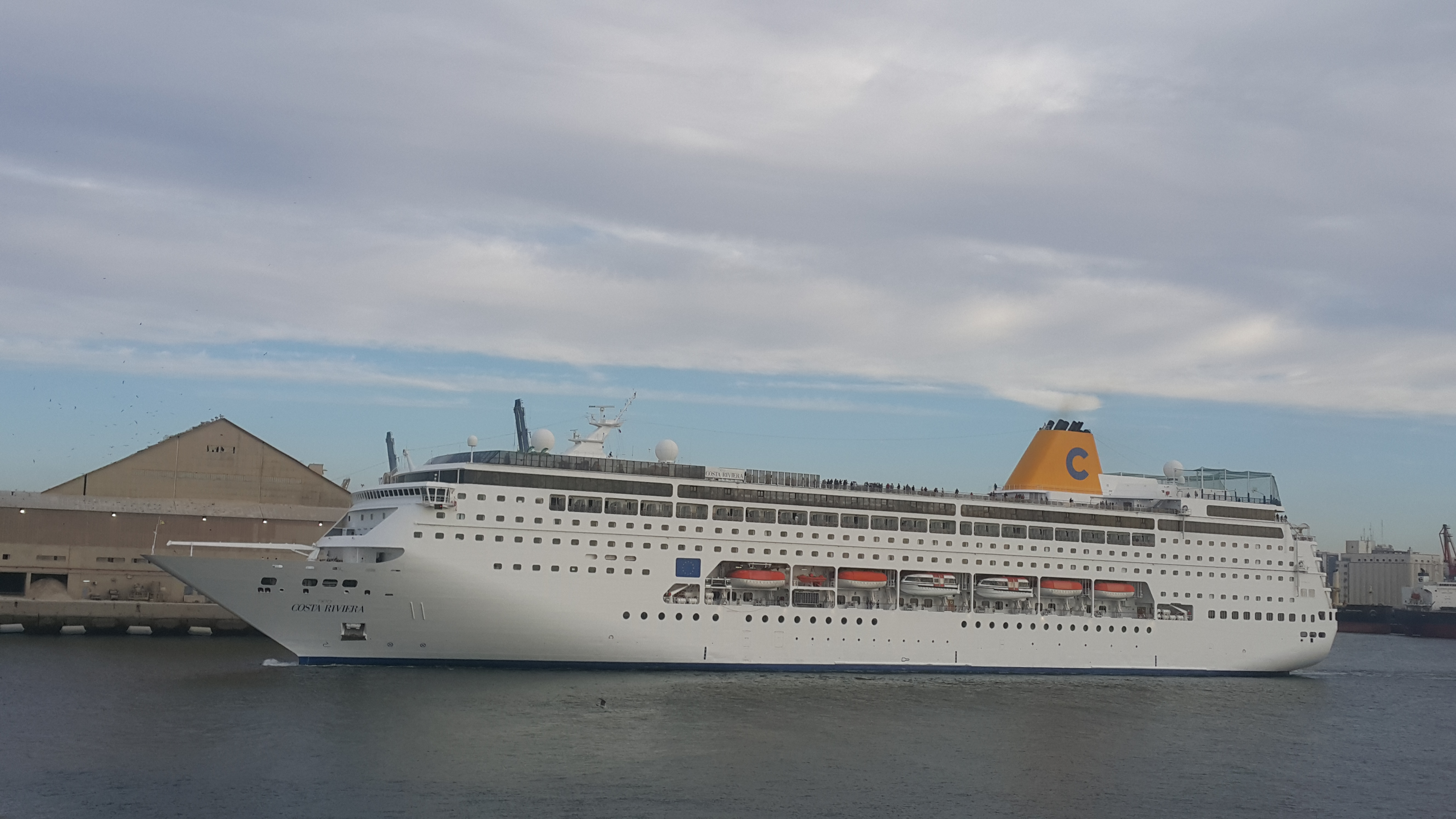 Croisière COSTA NEORIVIERA au port de Casablanca - Morocco - IMO: 9172777 Pavillon: Italy Genre du navire: Passenger Année de Construction: 1999